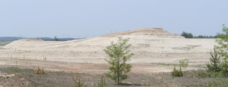 Landschaftskunstobjekt - Nachbildung eines menschlichen Ohres